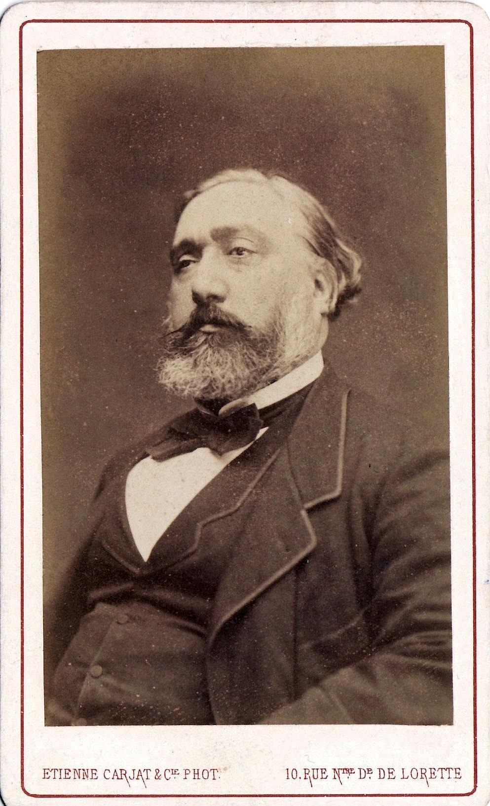 Photo carte de visite de Léon Gambetta. Sépia, 5x8,5 sur carton 6,5x10,5 cm. Photographe Étienne Carjat(1828-1906), après 1869.